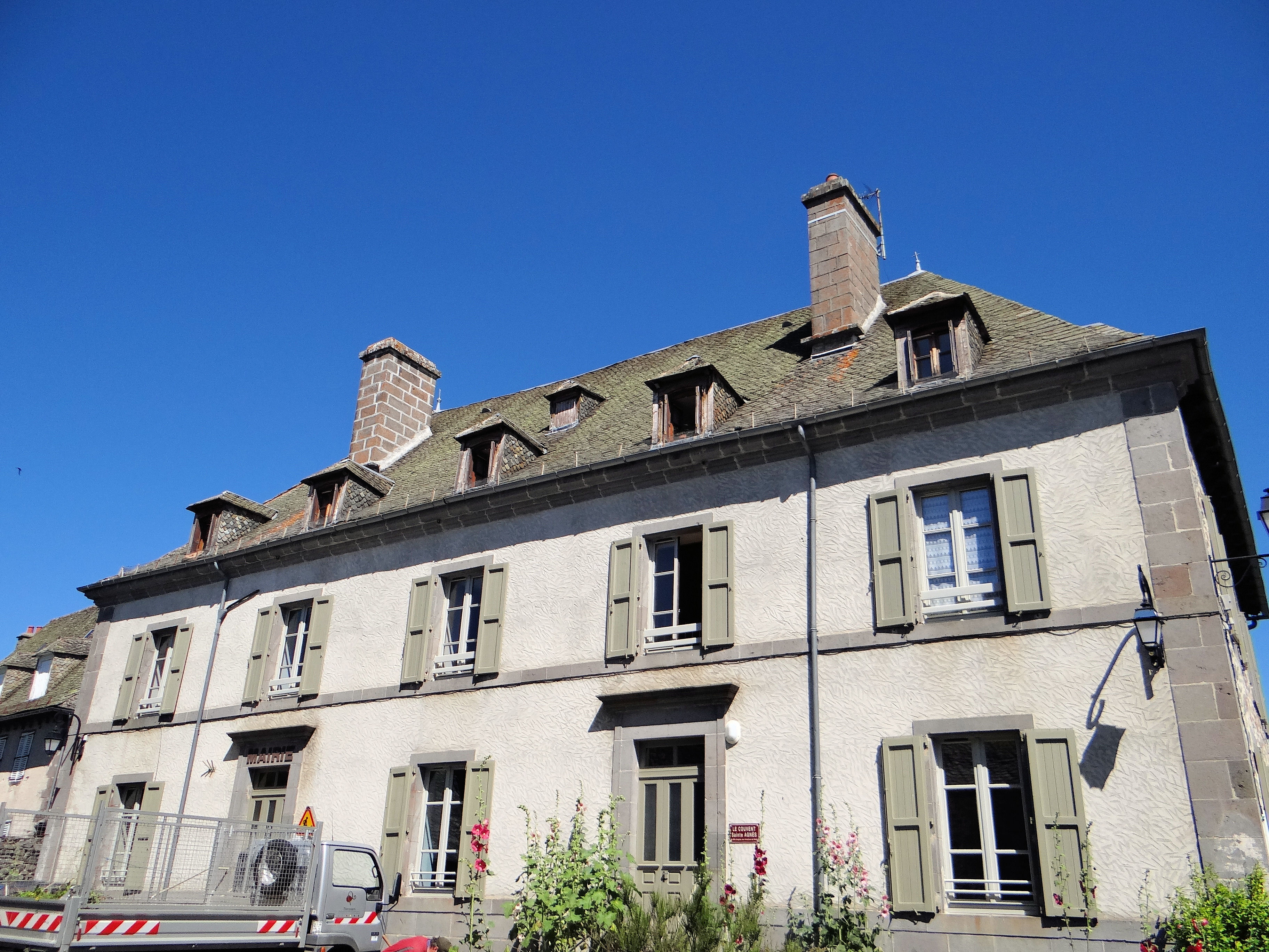 Thérondels - Mairie